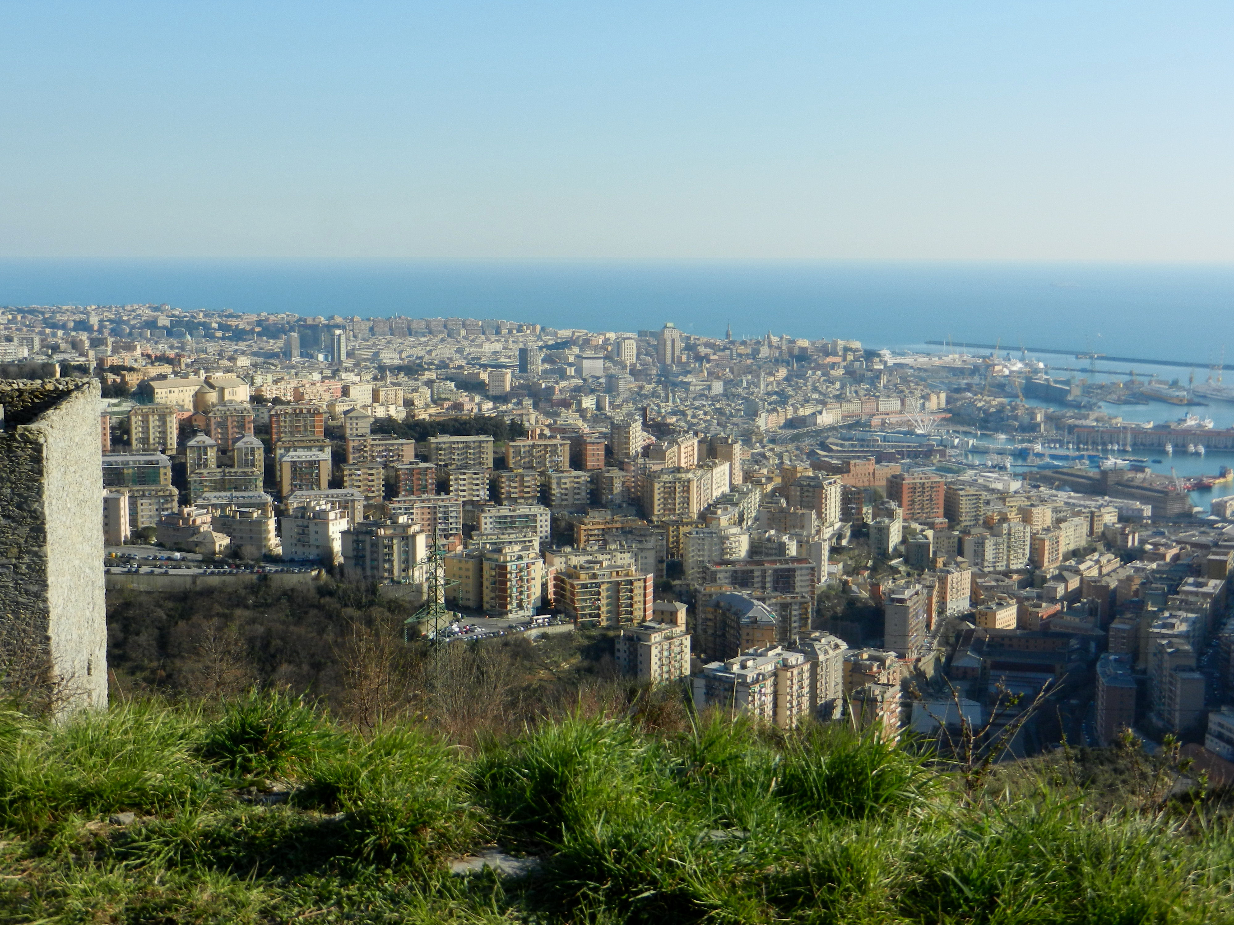 Genova panorama sui quartieri di Oregina e Lagaccio da Granarolo